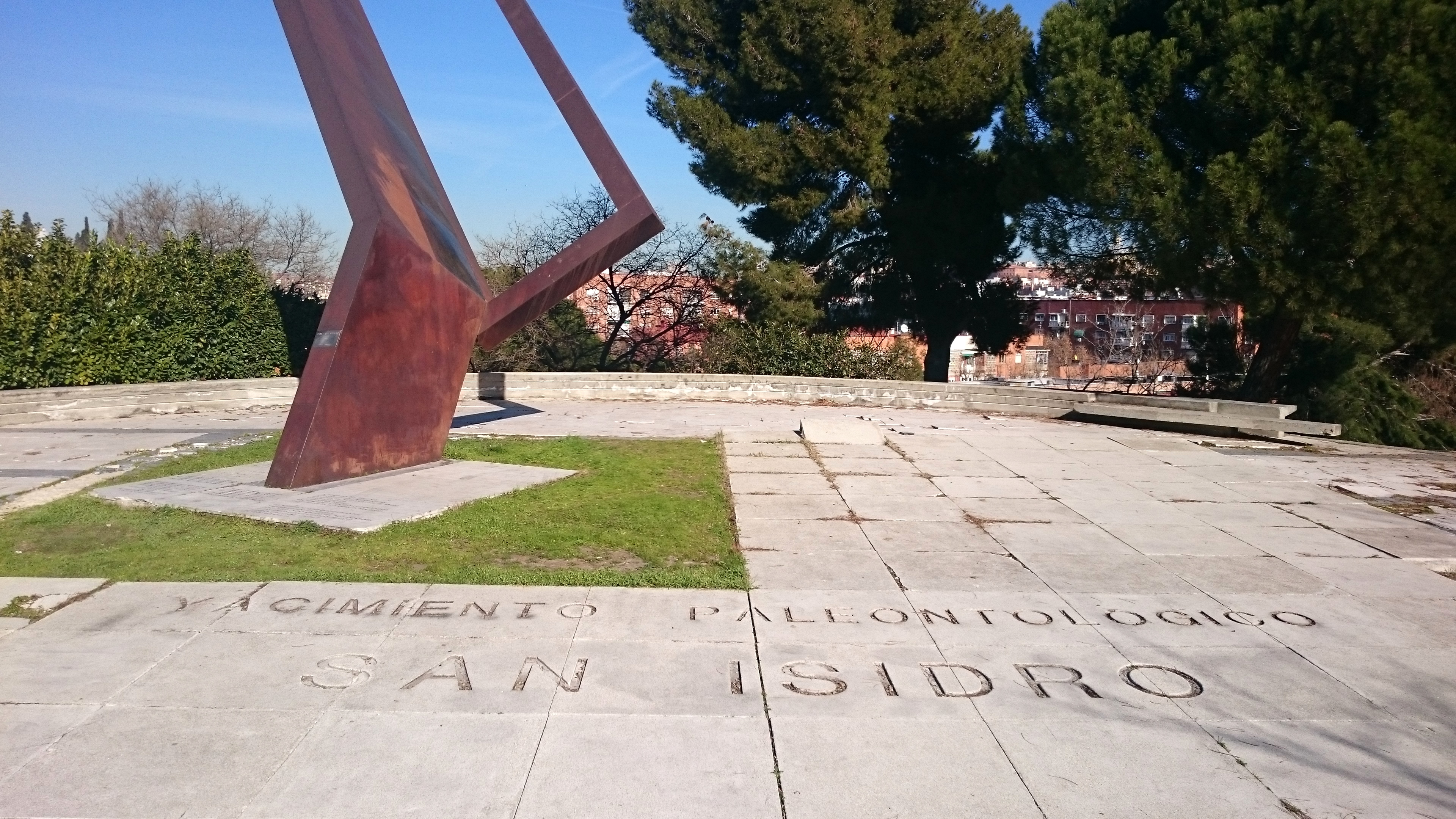 Escultura conceptual Ventana a Madrid. El monumento conmemora el yacimiento paleontológico del cerro de San Isidro. La escultura se erigió en 1990 y es obra de Enrique Salamanca. Más información en MonumentaMadrid.